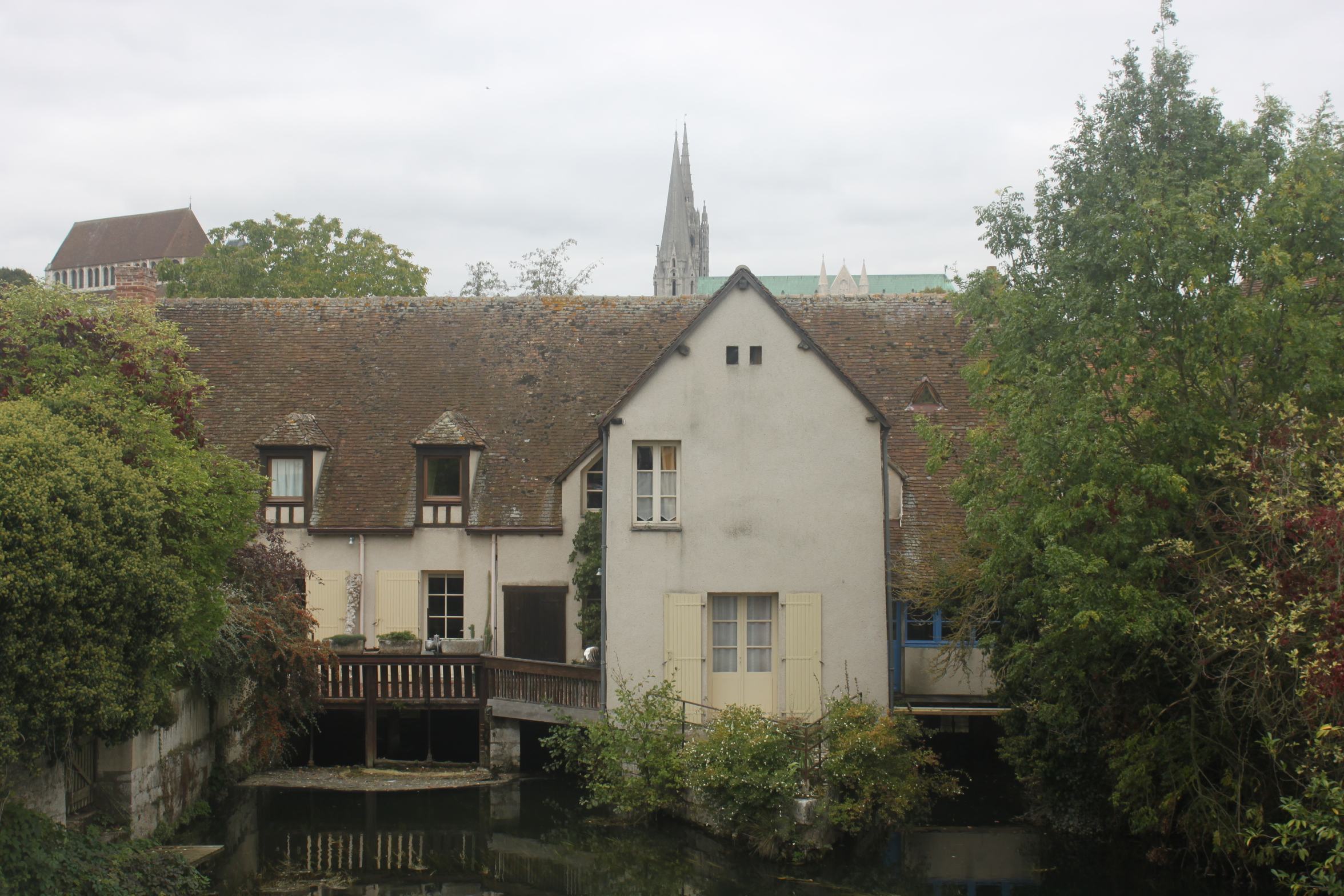 Moulin Saint-Père sur l'Eure à Chartres, Eure-et-Loir (vue amont). .